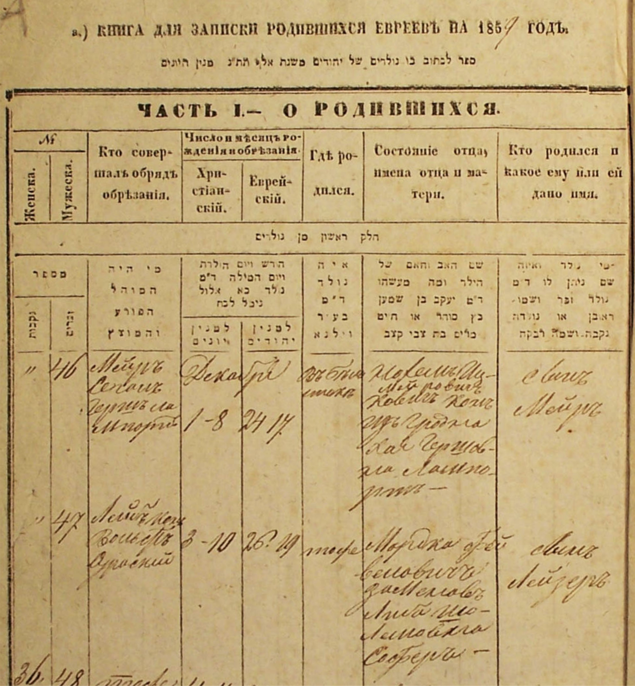 Karta z Księgi Urodzonych Okręgu Bożniczego w Białymstoku za rok 1859 (akt urodzenia Ludwika Zamenhofa, pozycja nr 47) - ze zbiorów Archiwum Państwowego w Białymstoku